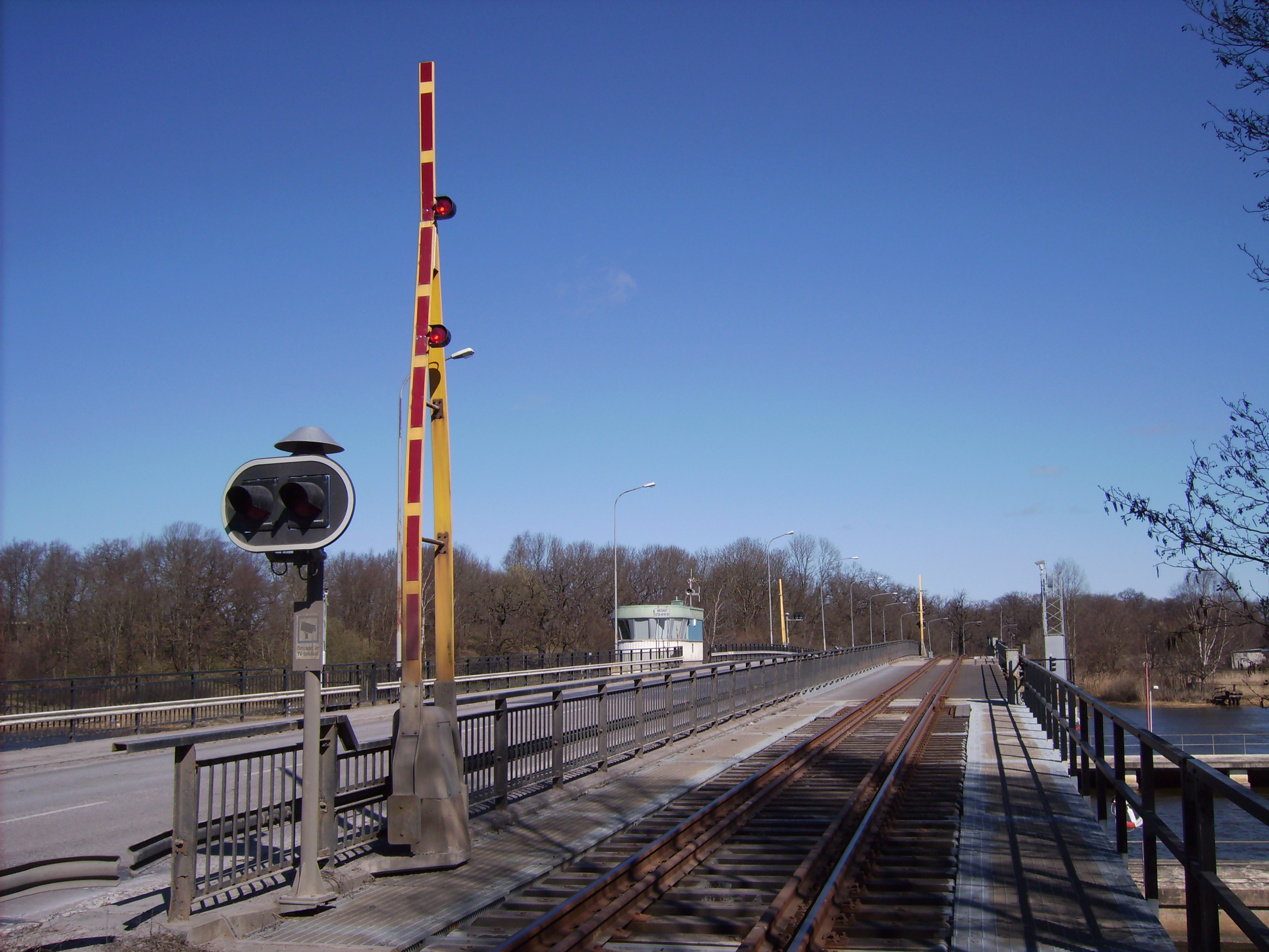 Bilden är fotograferad av Harri Blomberg. Photo by Harri Blomberg.